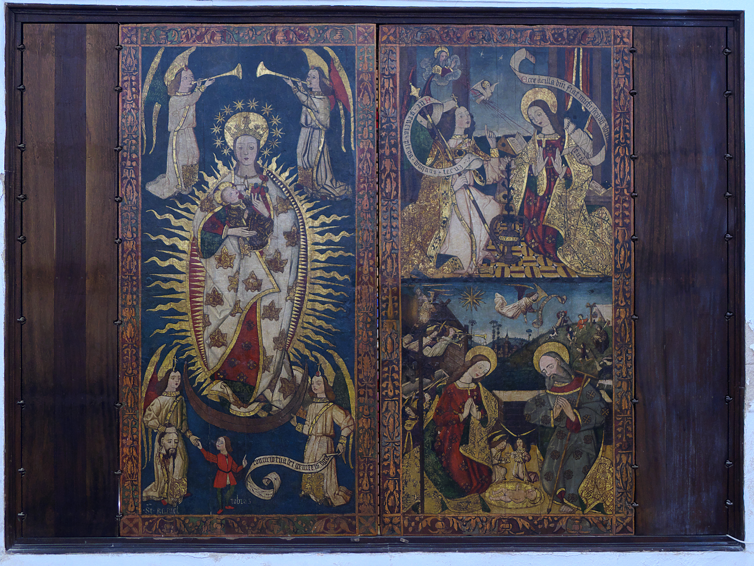 Monasterio de Santa Clara (Moguer). Pintura hispano-flamenca, óleo sobre tabla, del interior de las puertas del coro bajo. Último tercio del siglo XV.